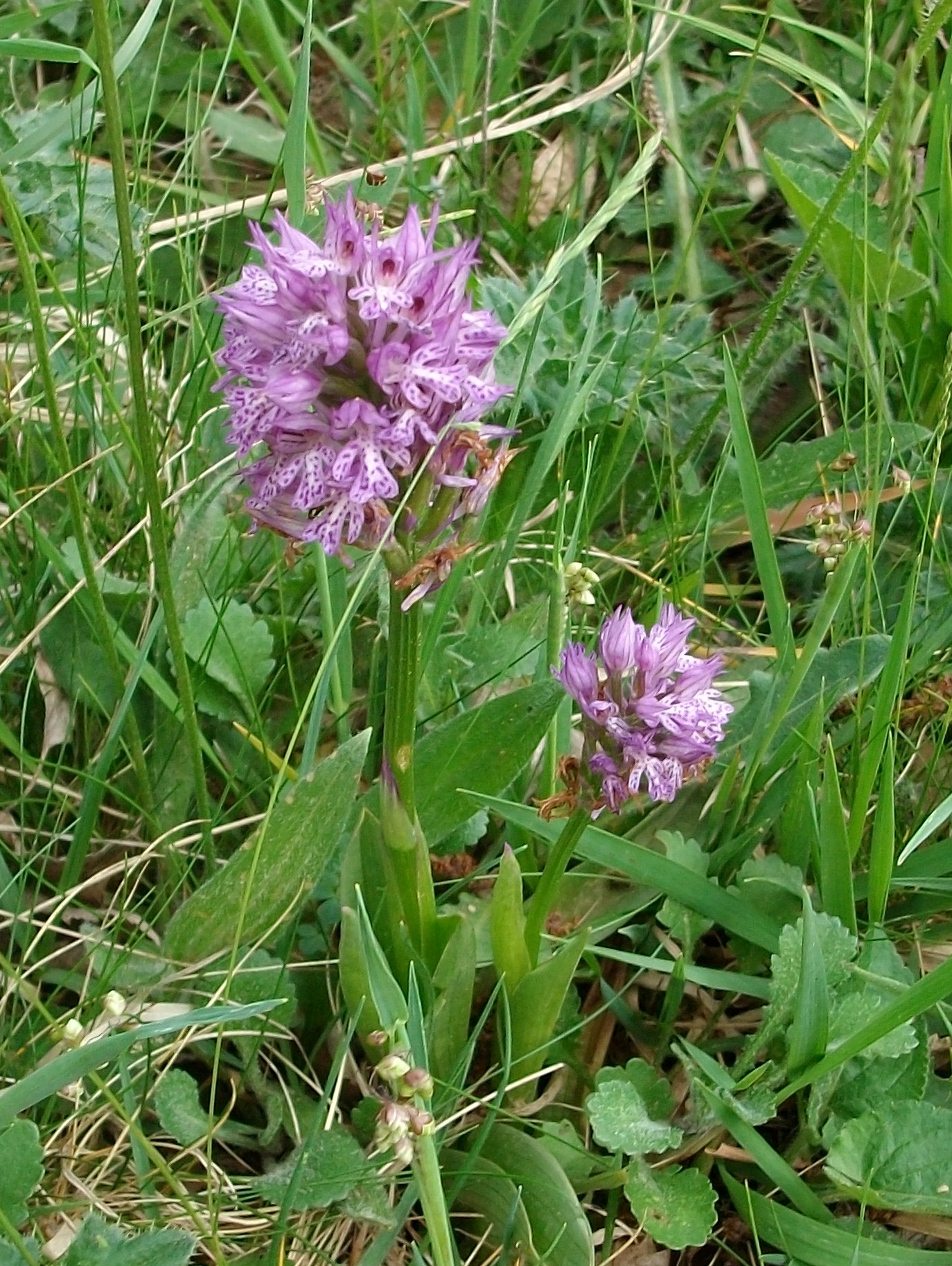 Dreizähniges Knabenkraut (Neotinea tridentata syn. Orchis tridentata) im Naturschutzgebiet Wulsenberg, Marsberg, Germany.